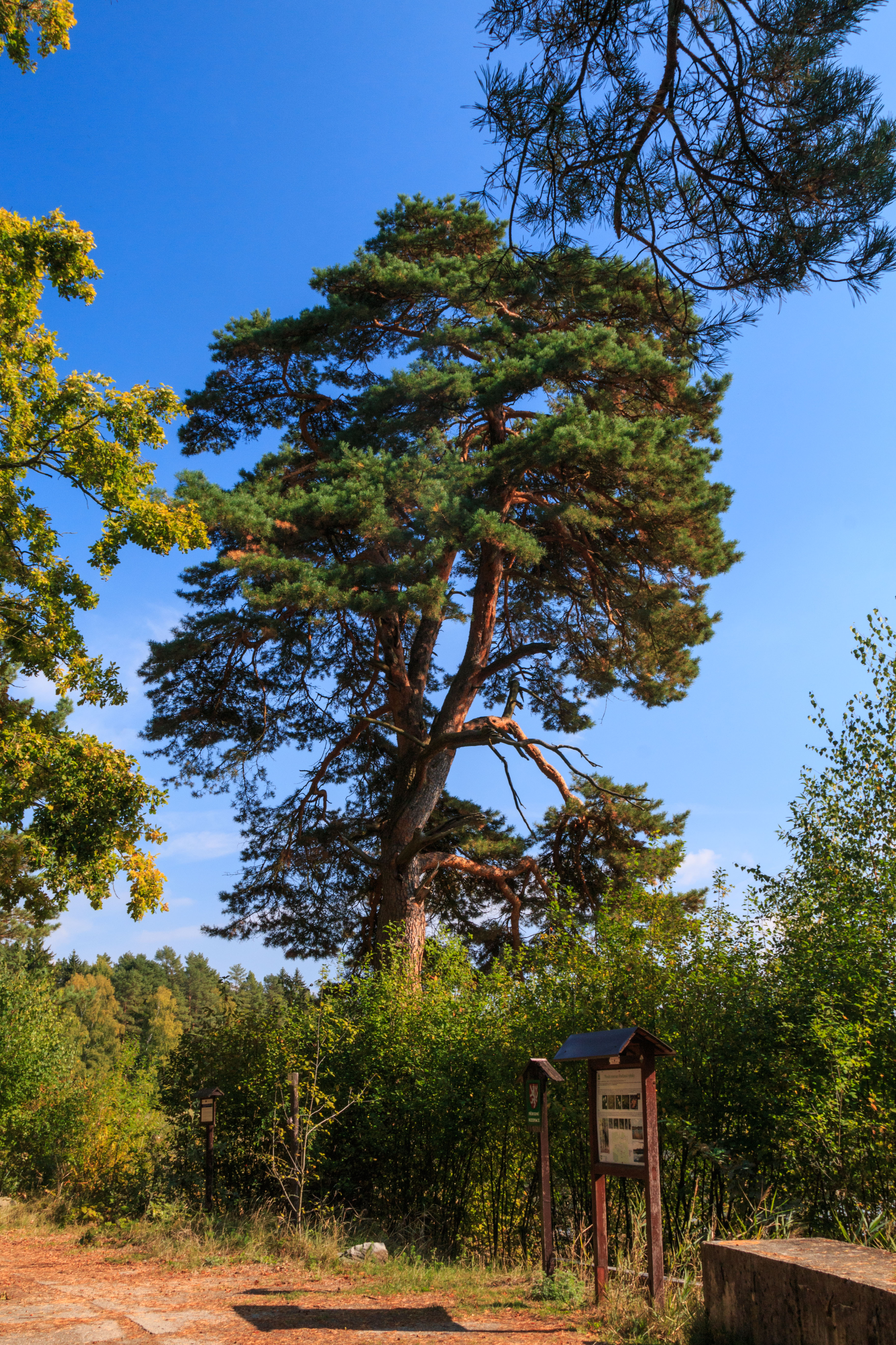 Památná borovice u rybníka Držník Project: Vodstvo.